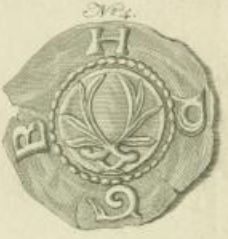 Brakteat Burggraf Heinrichs III. von Dohna